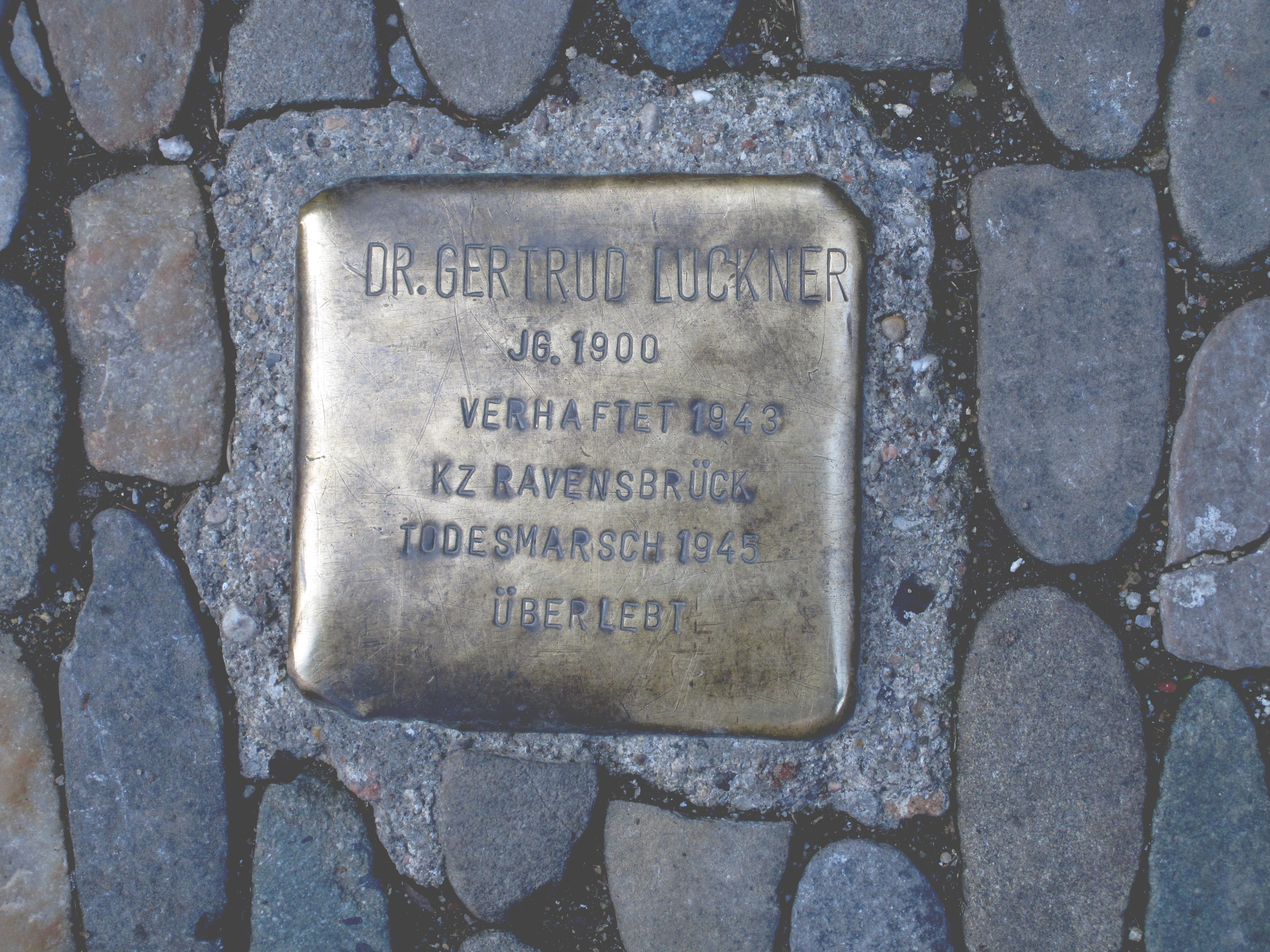 Stolperstein zum Gedenken an Dr. Gertrud Luckner vor der Gertrud-Luckner-Gewerbeschule Freiburg im Breisgau.